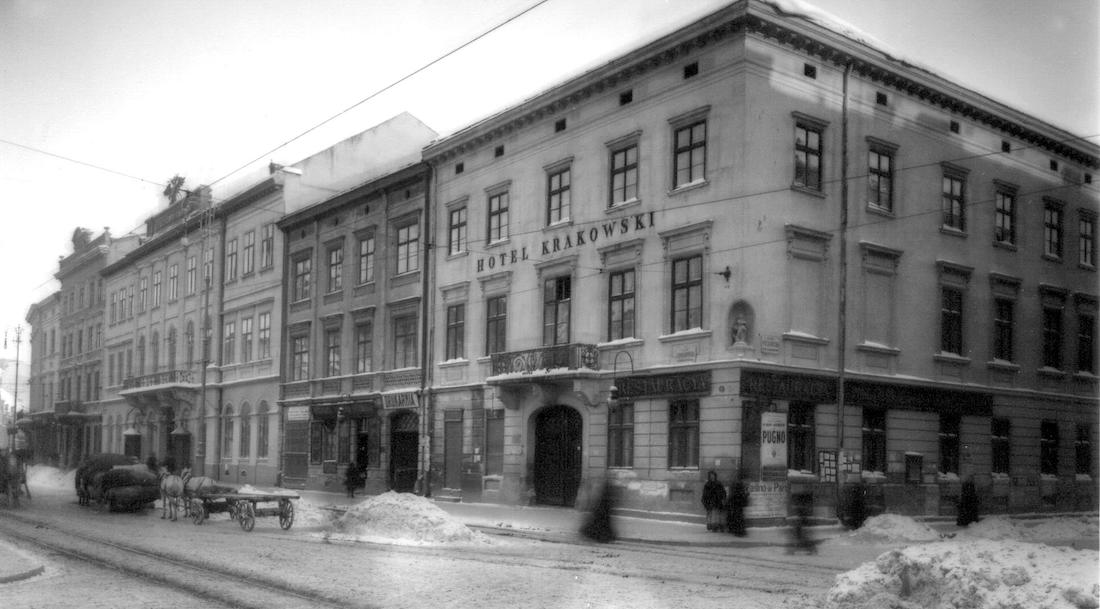 Готелі Львова